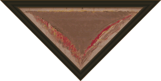 Câmp (Feld), Öl auf Leinwand 760x540x540mm